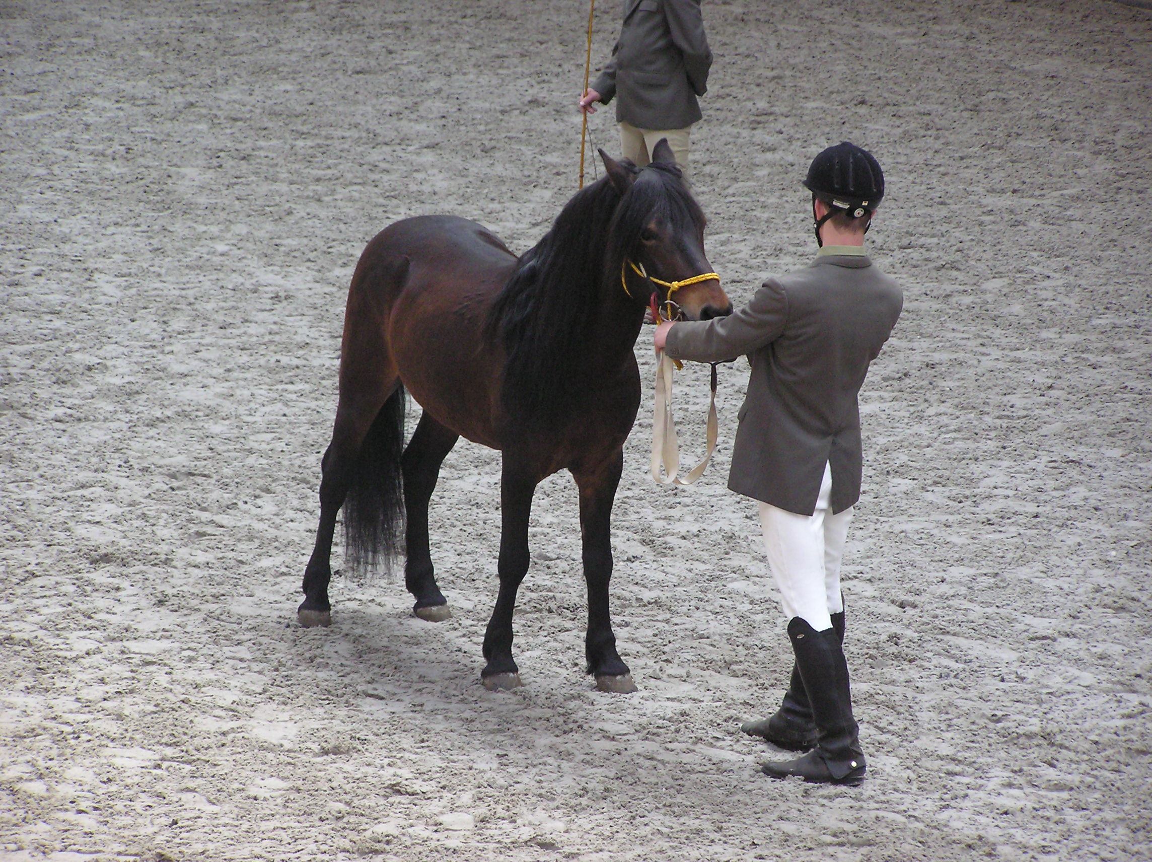 Hucul pony